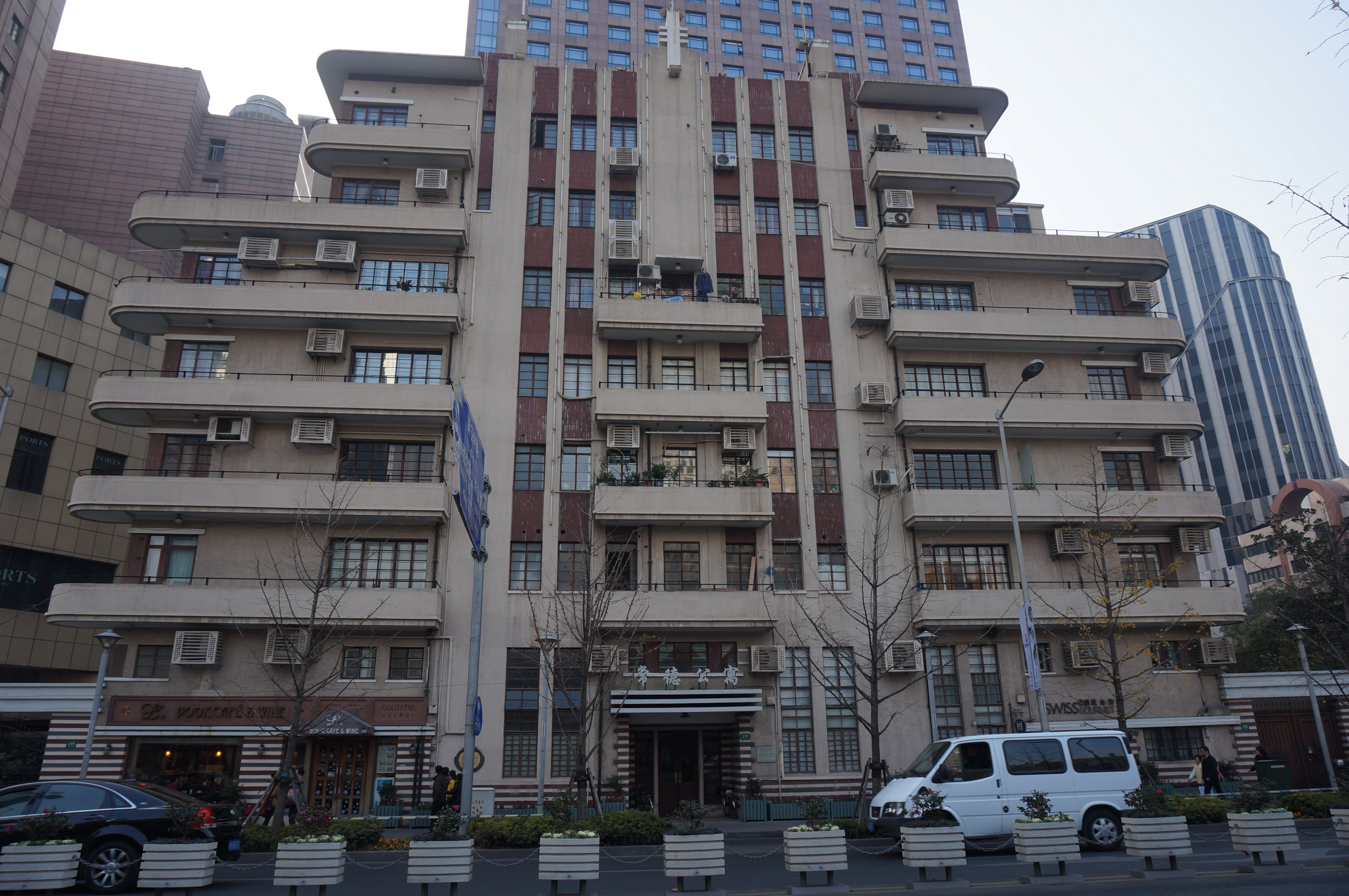 中文（中国大陆）: 上海常德公寓